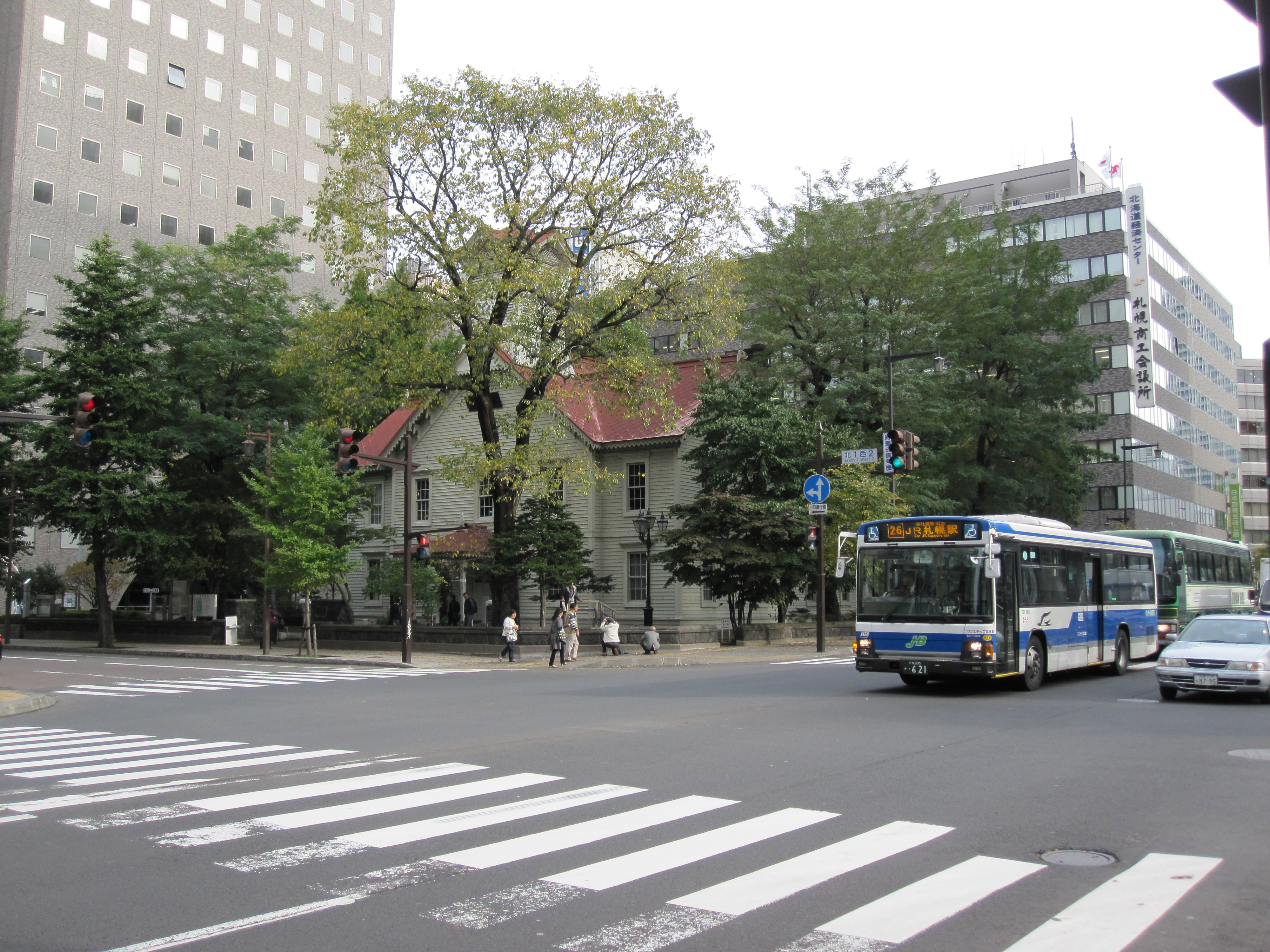 高層ビルに囲まれている札幌市時計台。存在感の乏しさで話題になることもしばしばある。